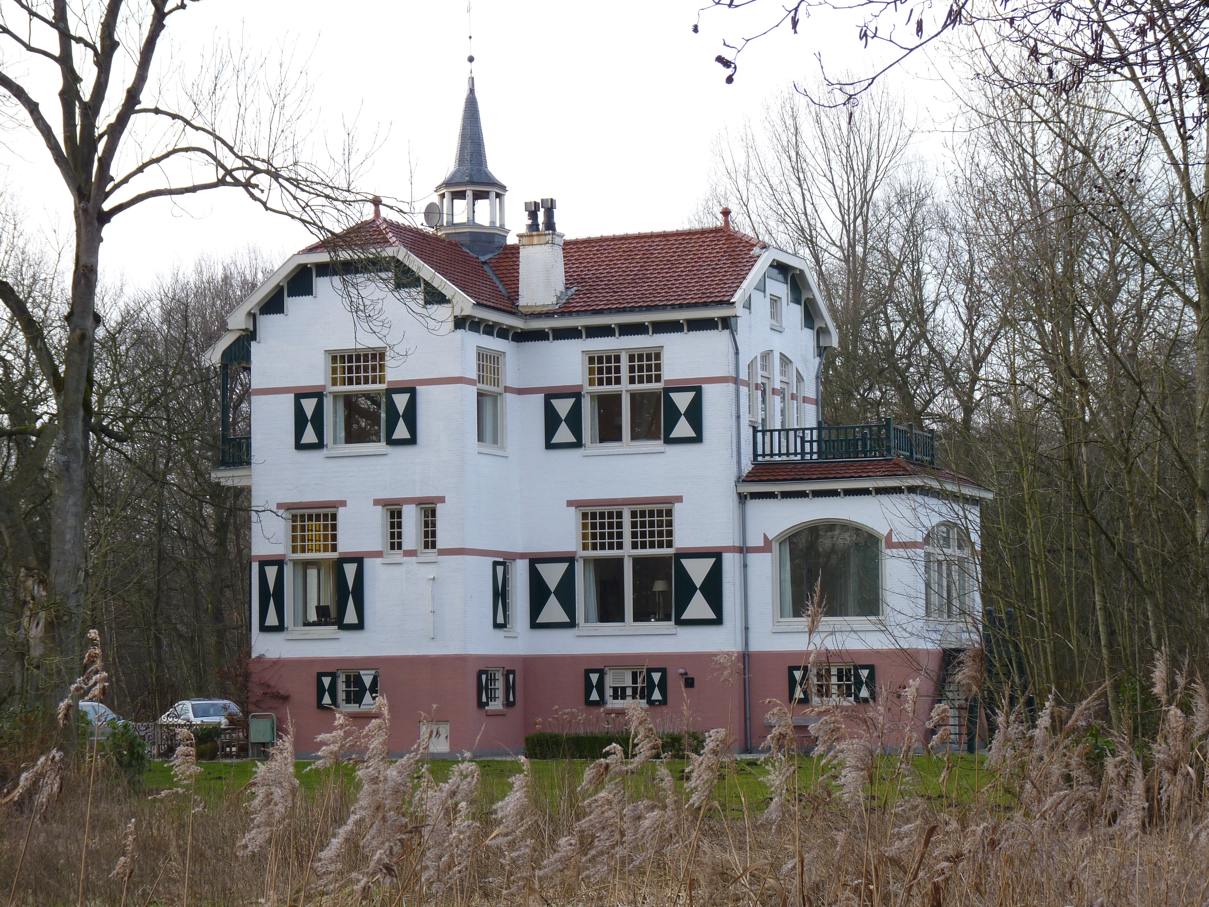 Paterswolde Frieselaan 4